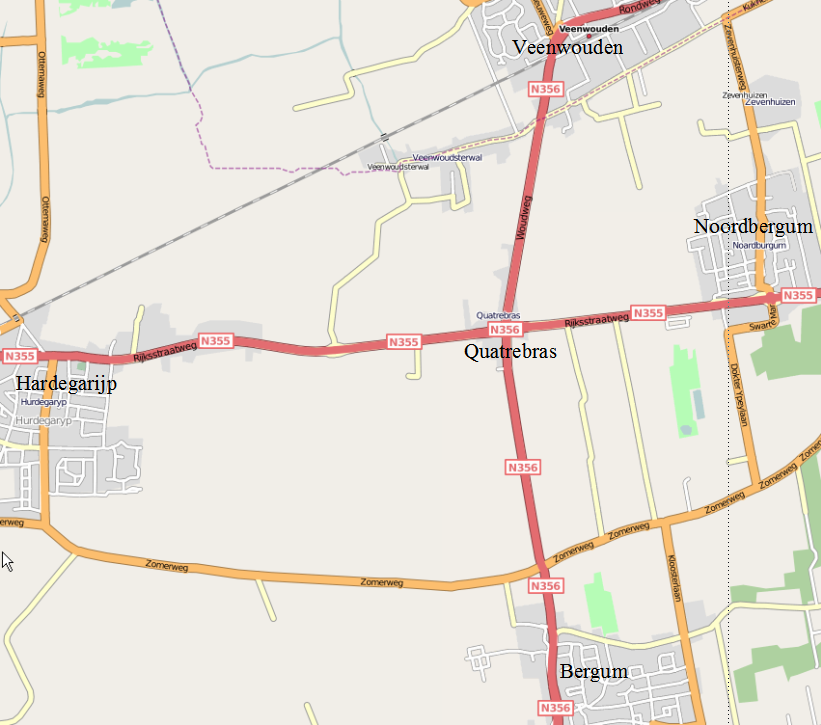 Quatrebras, kruising van N355 en N356